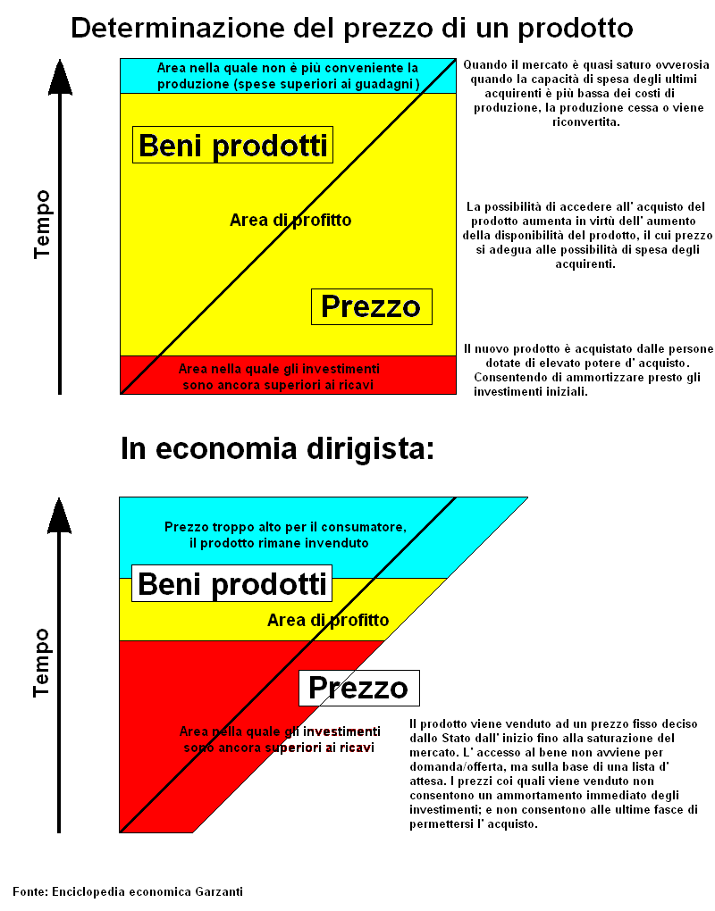 diagramma di economia comunista